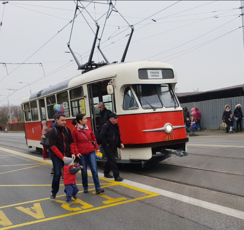 Tatra T2 vezúc ľudí na DOD v Dopravnom podniku.